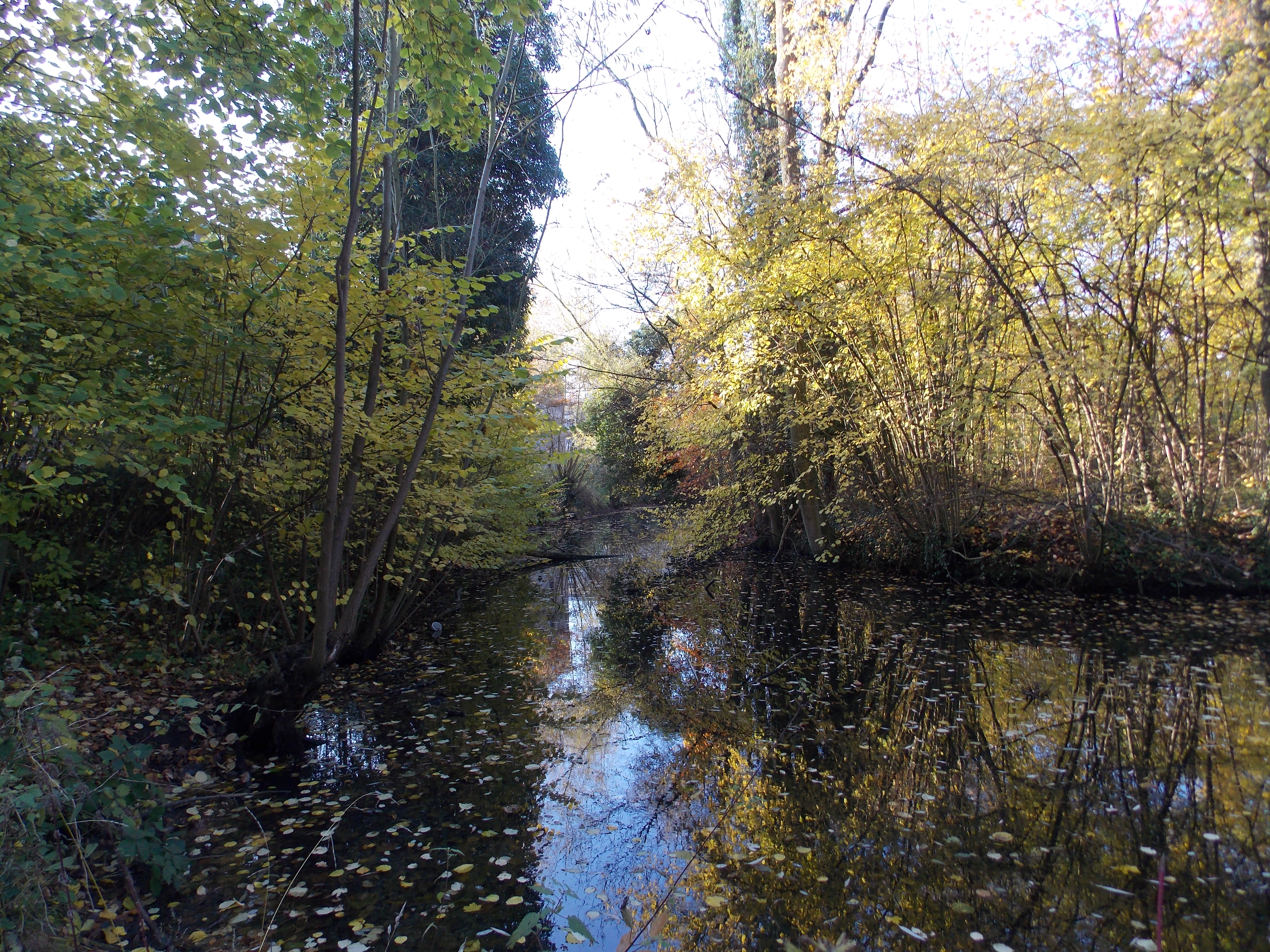 Die Gräfte von Haus Rumphorst, Herbstaspekt.